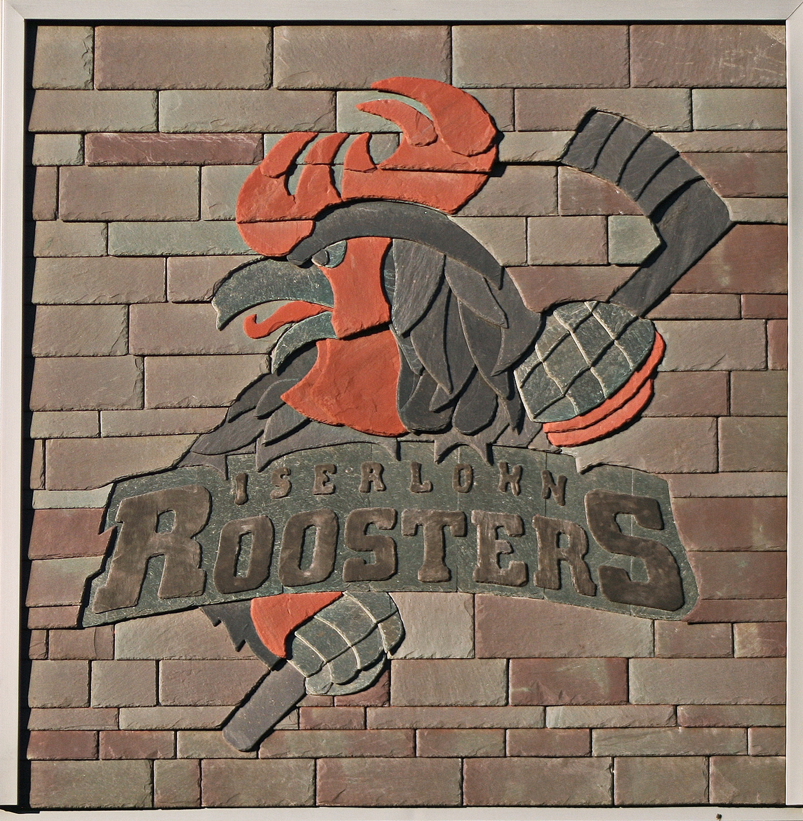 Logo des Eihockeyvereins Iserlohn Roosters an einer Giebelwand in Iserlohn-Wermingsen, Reidemeisterstraße 9. Das Logo aus Naturschiefer ist vier Quadratmeter groß, 200 Kilogramm schwer und wurde von Torsten Thielmann, Iserlohn, gefertigt.